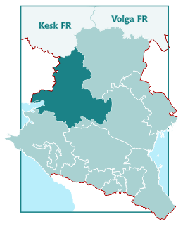 Rostovi oblasti asukoht Lõuna föderaalringkonna kaardil.